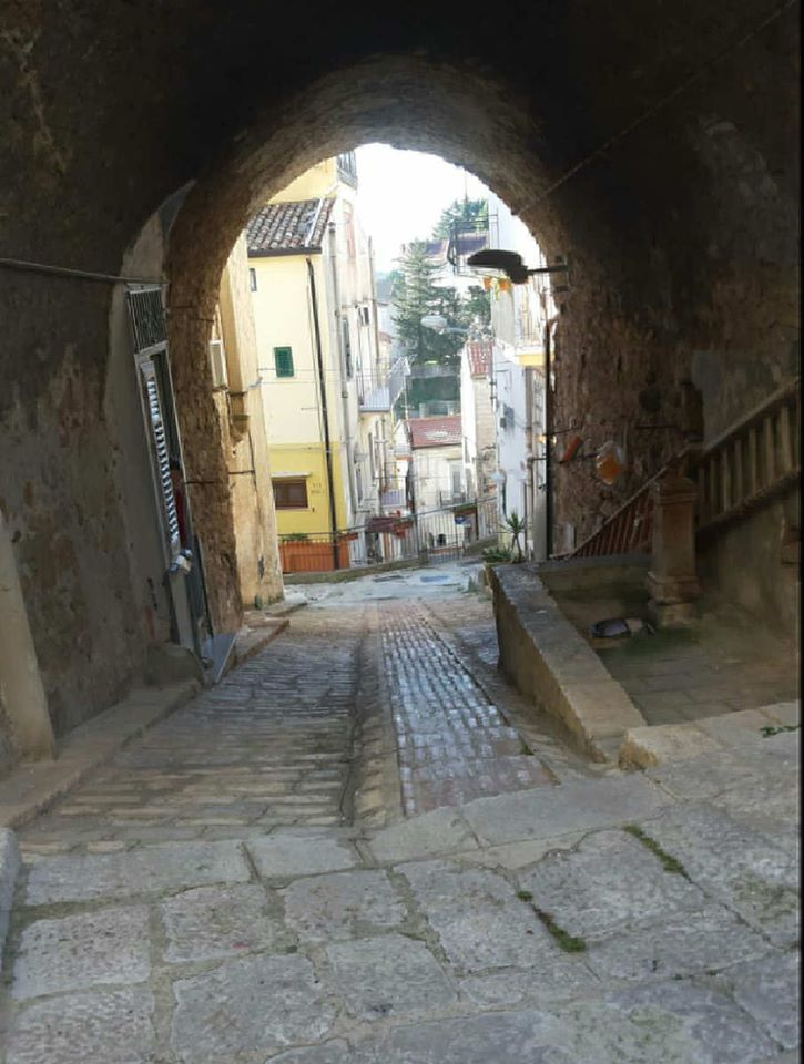 Via Arco Leone e arco omonimo in Piana degli Albanesi.